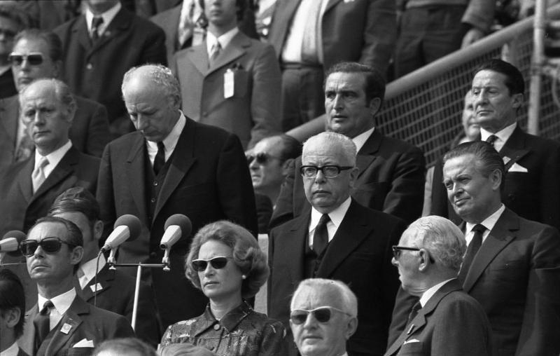 Trauerfeier im Olympiastadion